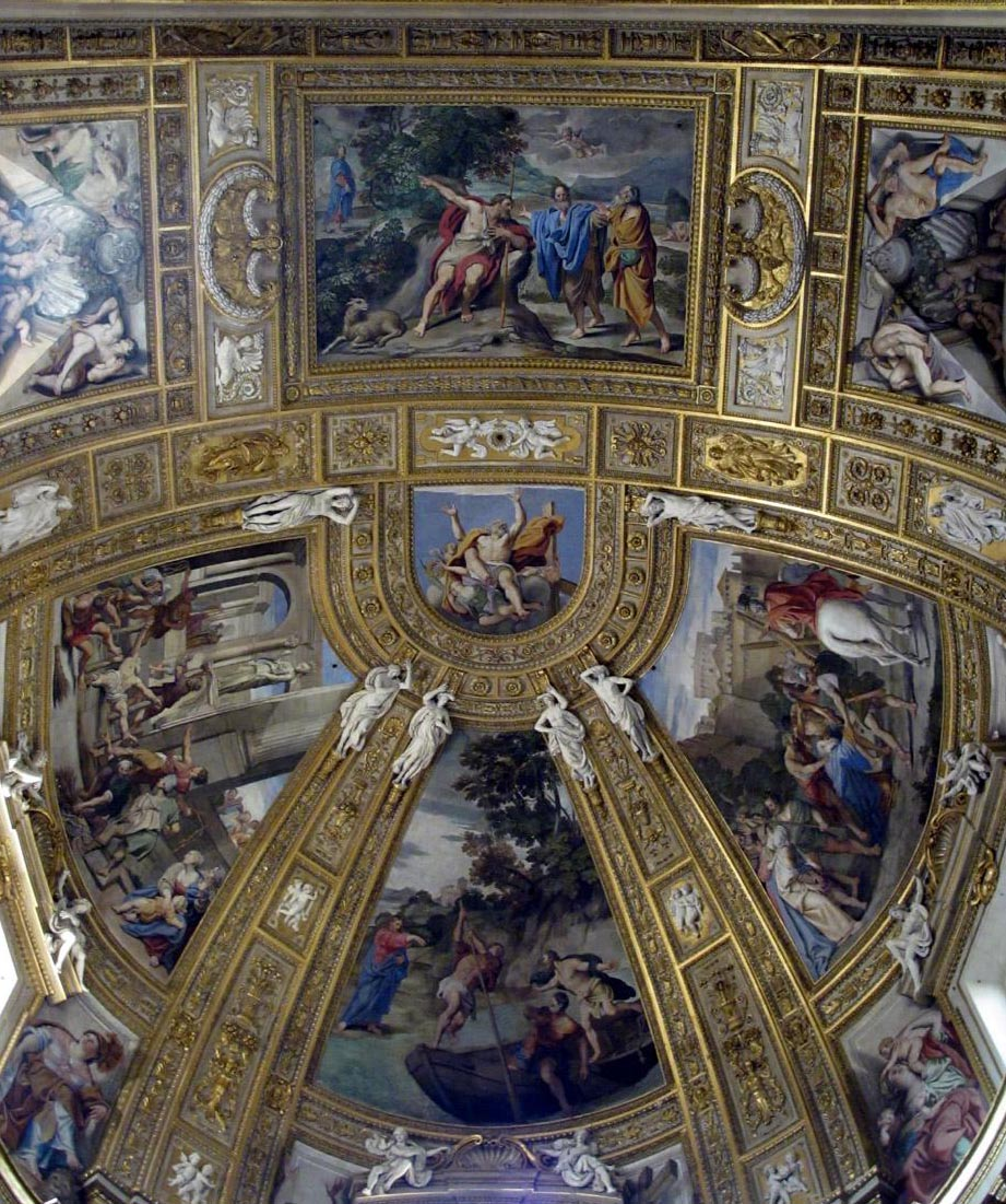 Frescos de San Andres del Valle, Roma.